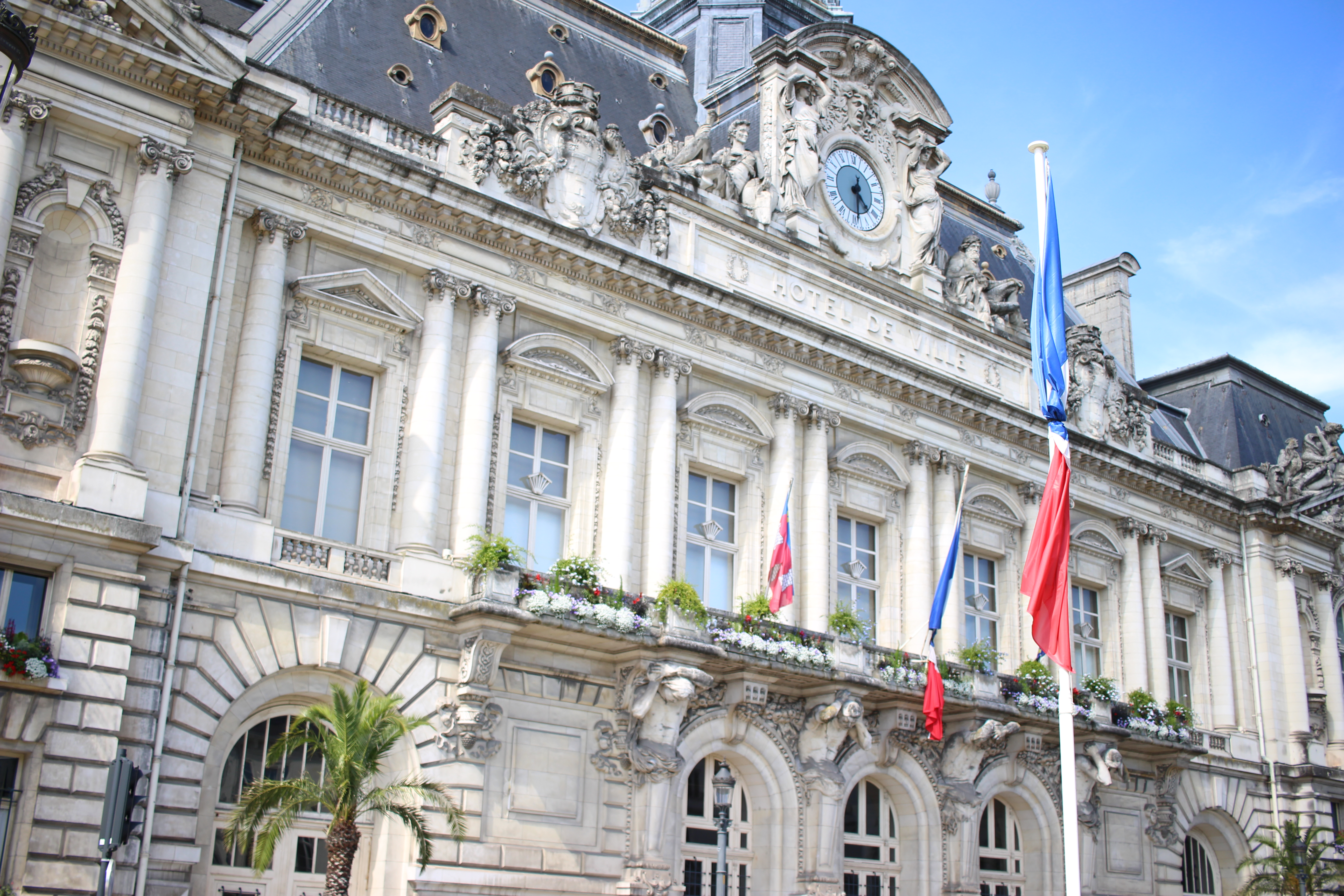 L'Hôtel de ville de Tours au lendemain de l'Attentat du 14 juillet à Nice. Les drapeaux sont en berne, signe de deuil. Le deuil national commence officiellement le lendemain, le 16 juillet.